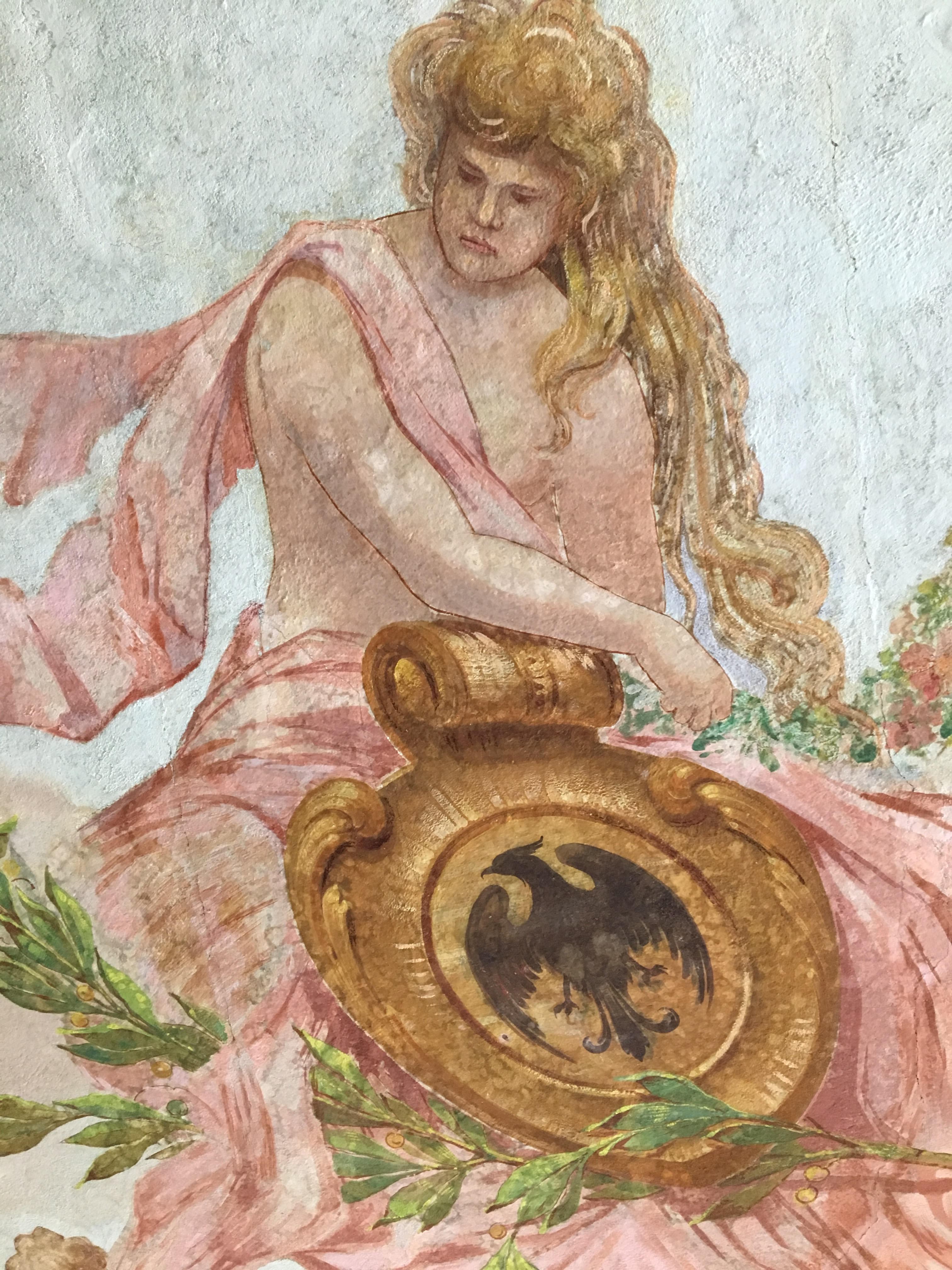 Mittpartiet av takmålningen i festvåningen på Grand Hotell i Karlstad, målad av Olof W. Nilssons 1904. Centralmotivet föreställer en kvinna hållande Värmlands landskapsvapen, i de färger som var officiellt fastställda vid tiden.